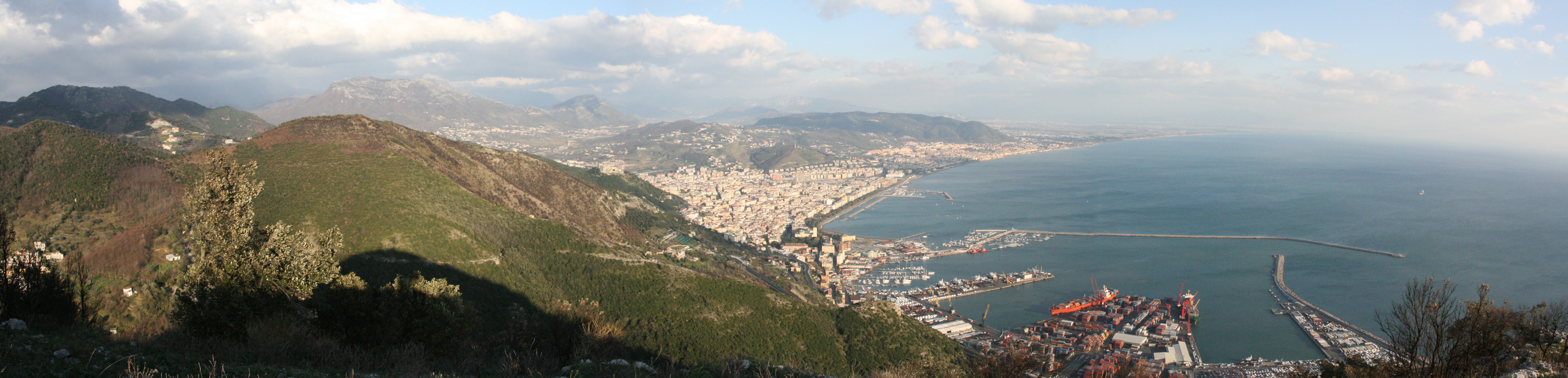 Vista di Salerno da Monte S. Liberatore.